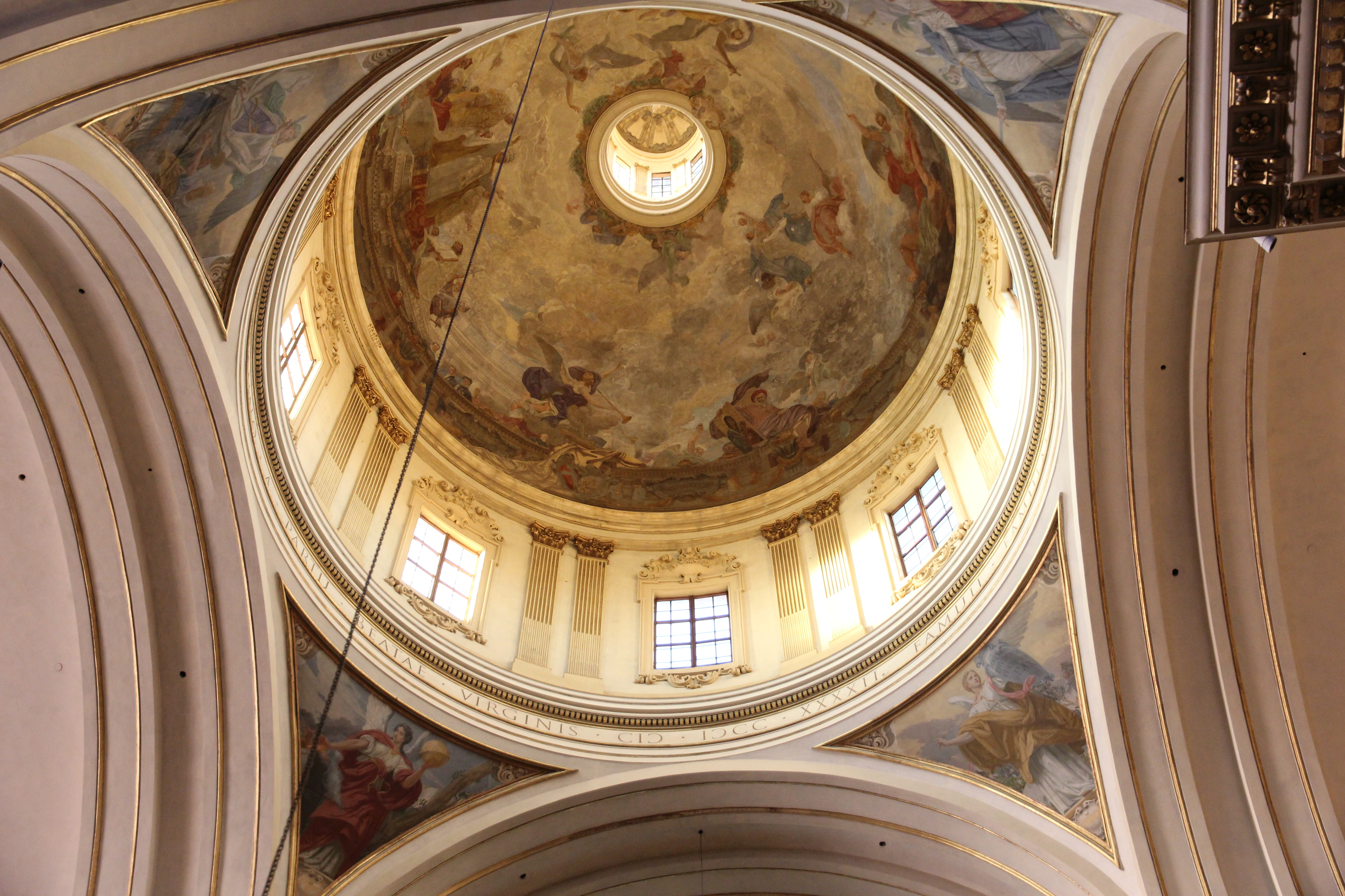 Bologna, santuario della Madonna di San Luca This is a photo of a monument which is part of cultural heritage of Italy.